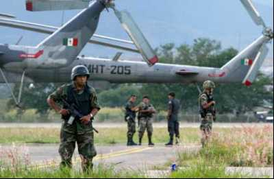 Cooperación de la Fuerza Aérea Mexicana en el traslado del Ejército Mexicano así como en el reconocimiento de zonas de cultivo.